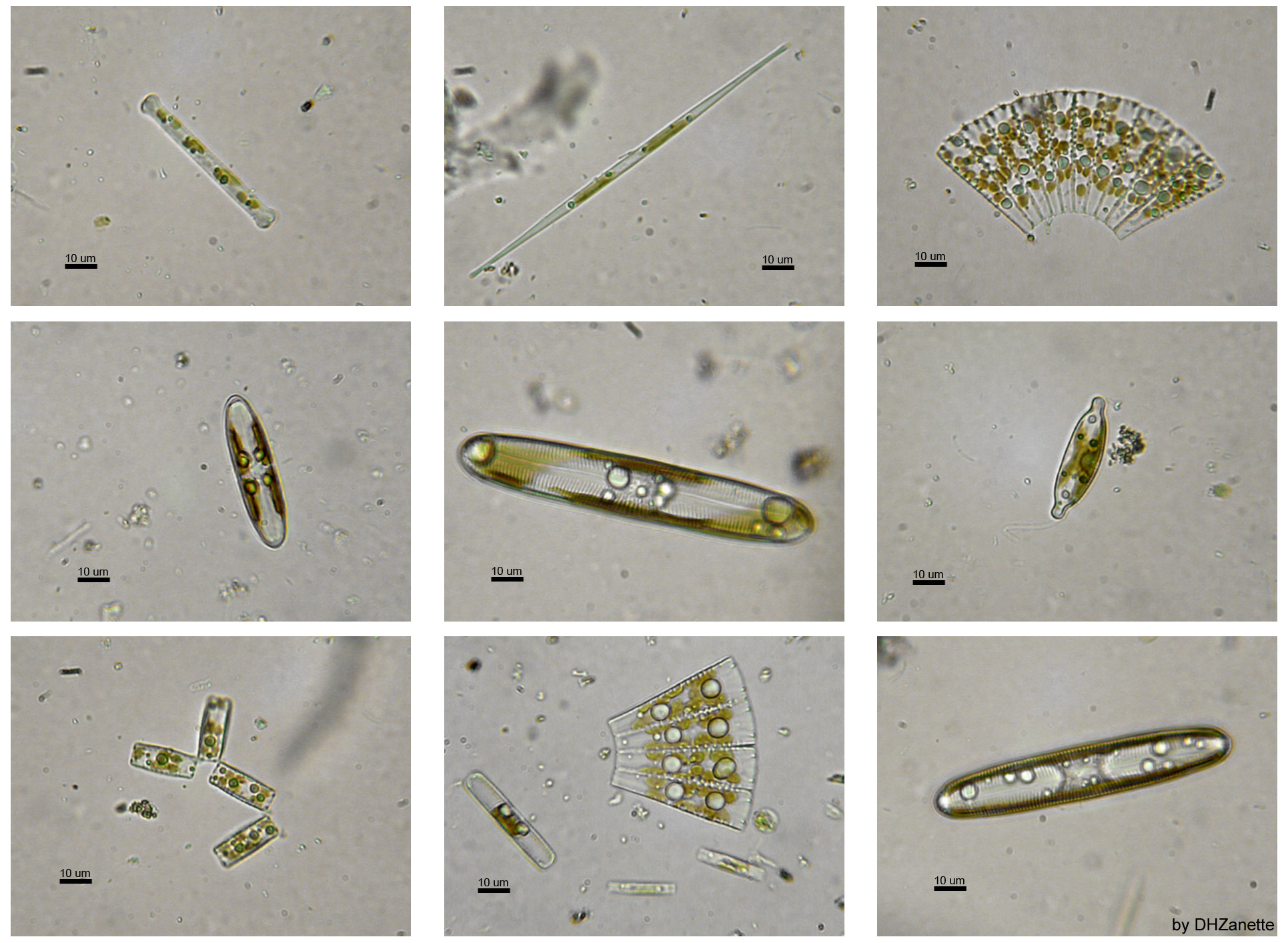 Diatoms: eukaryotic algae.